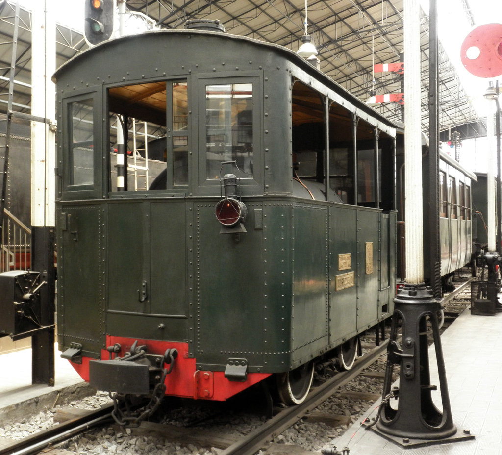 Dampfstraßenbahn im Museum für Wissenschaft und Technik in Mailand